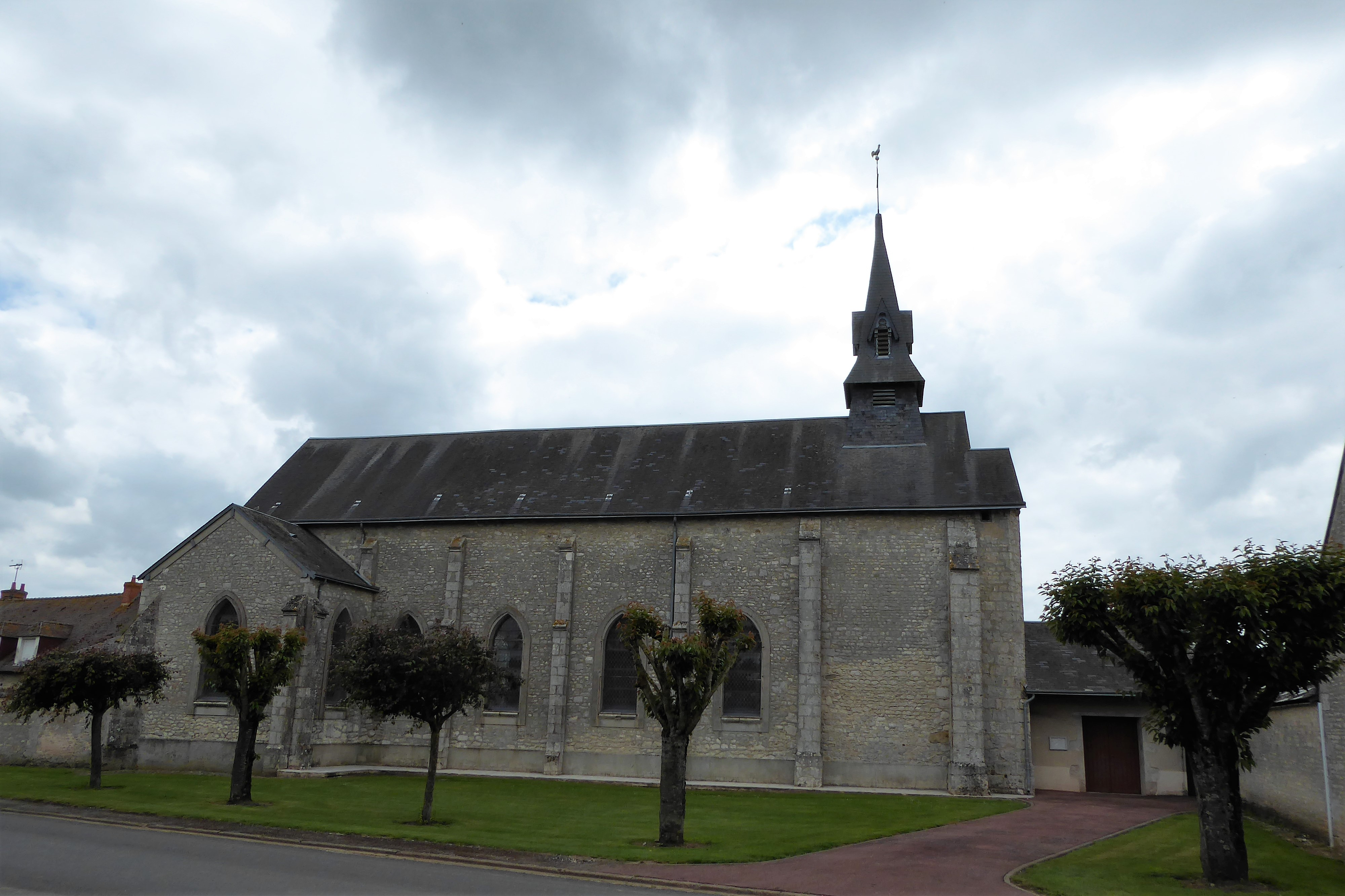 église Saint-Martin de Bazoches-les-Hautes, Eure-et-Loir, France.